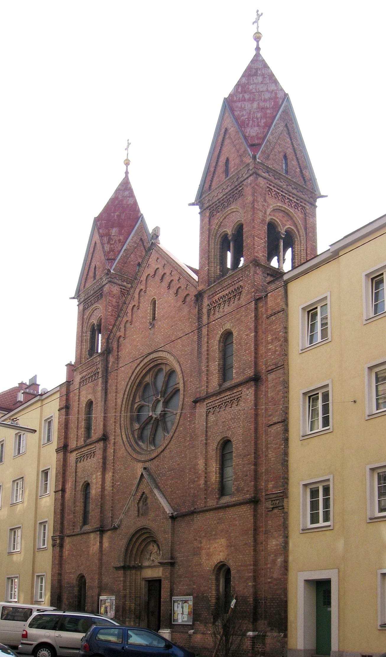 Kirche Herz Jesu in Wien Margareten